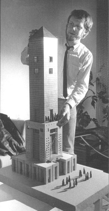 H.R. Hiegel